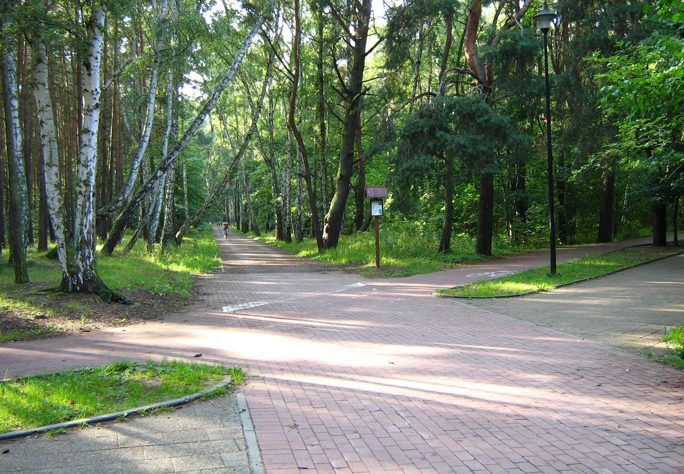 Skrzyżowanie ścieżek (w tym rowerowej i edukacyjnej) w leśnej części parku im. R. Reagana w Gdańsku.